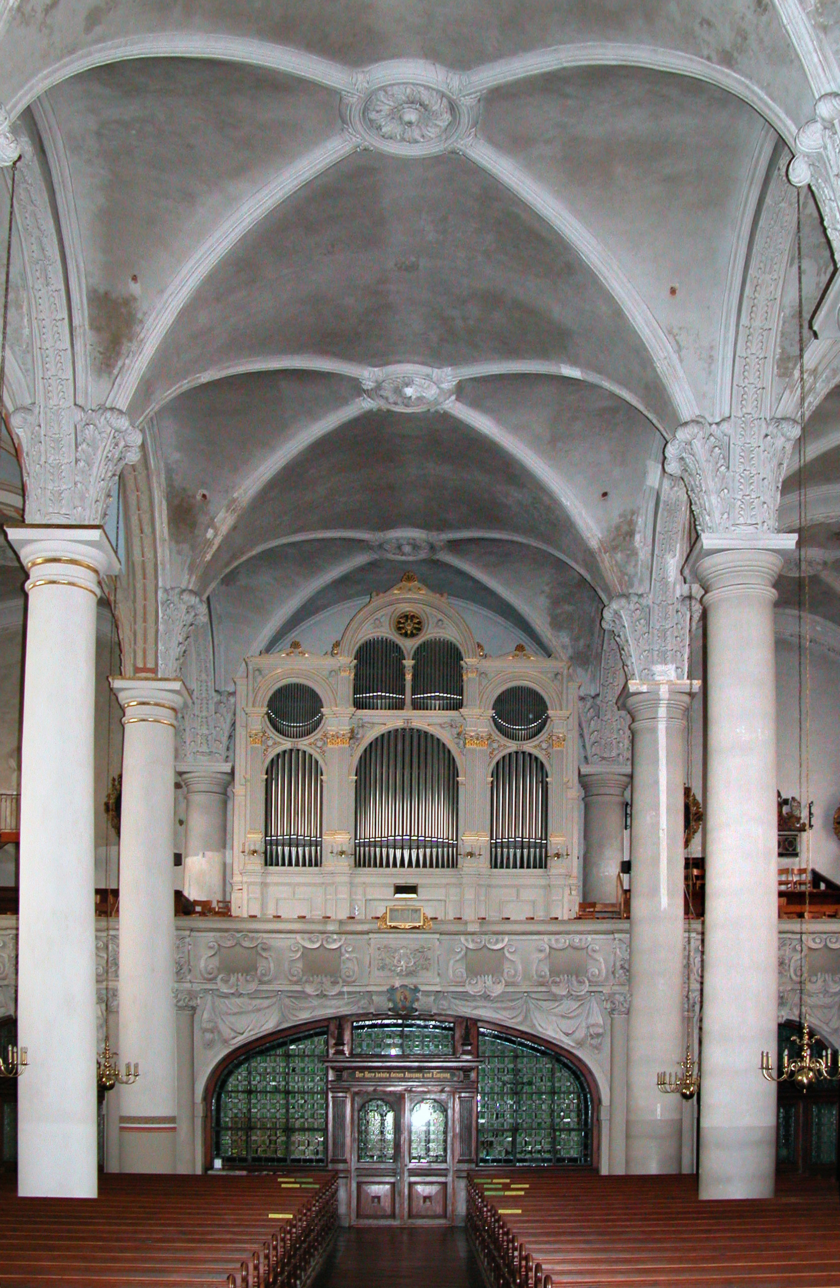 16.06.2004 09406 Marienberg, Marienstraße (GMP: 50.650456,13.165675): St. Marien Kirche. Spätgotischer Bau (1558-1564). 1610 ausgebrannt, 1616 wieder aufgebaut. Dreischiffige Hallenkirche, Kreuzgratgewölbe von 1669 bis 1675, toskanische Säulen.[DSCN3842.TIF]20040616260DR.JPG(c)Blobelt